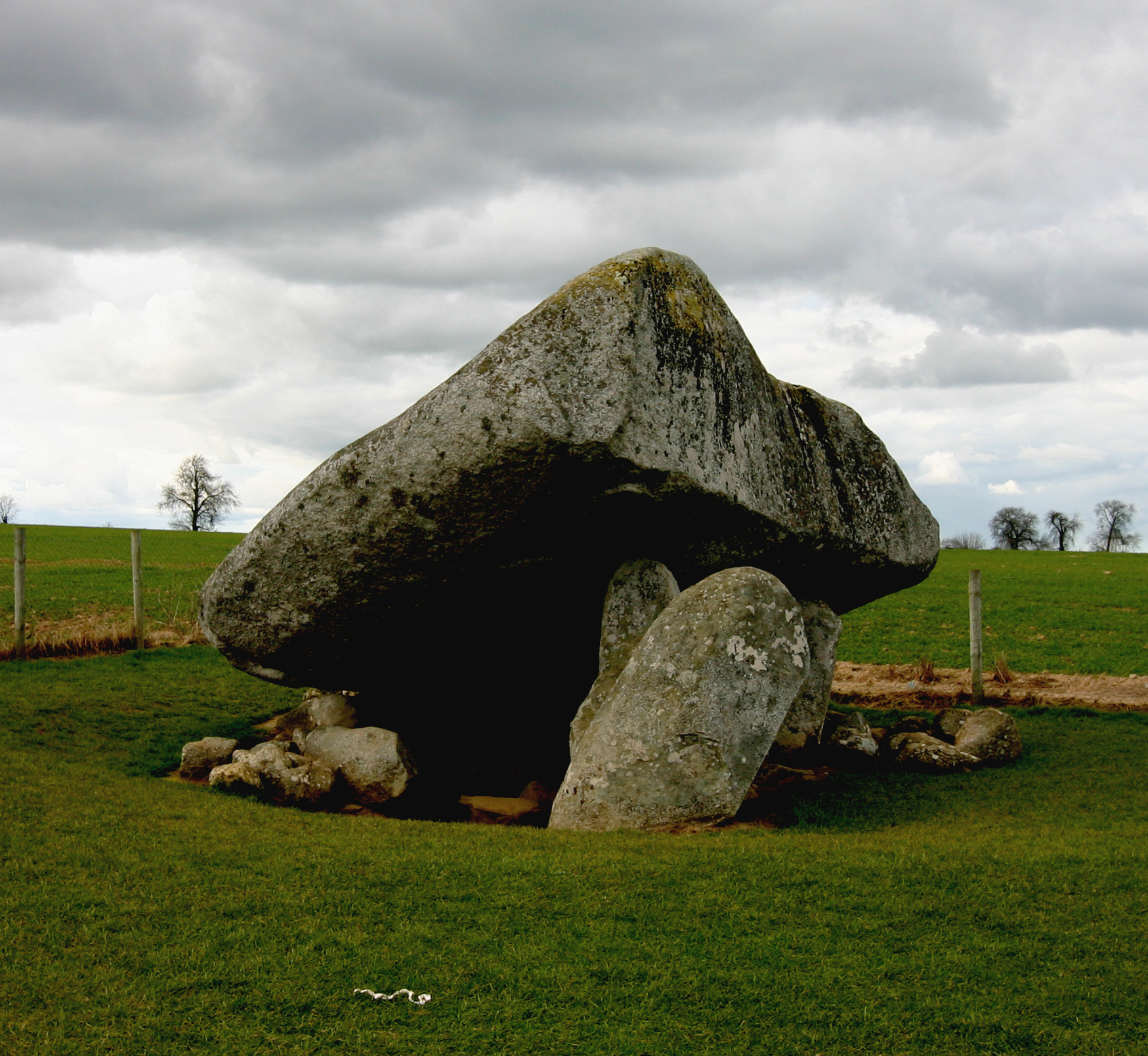 Brownshill Dolmen, Írország